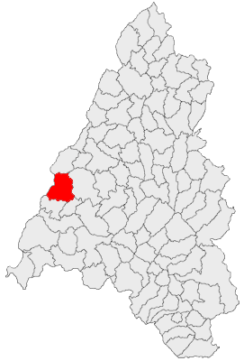 Categorie:Hărţi ale judeţului Bihor